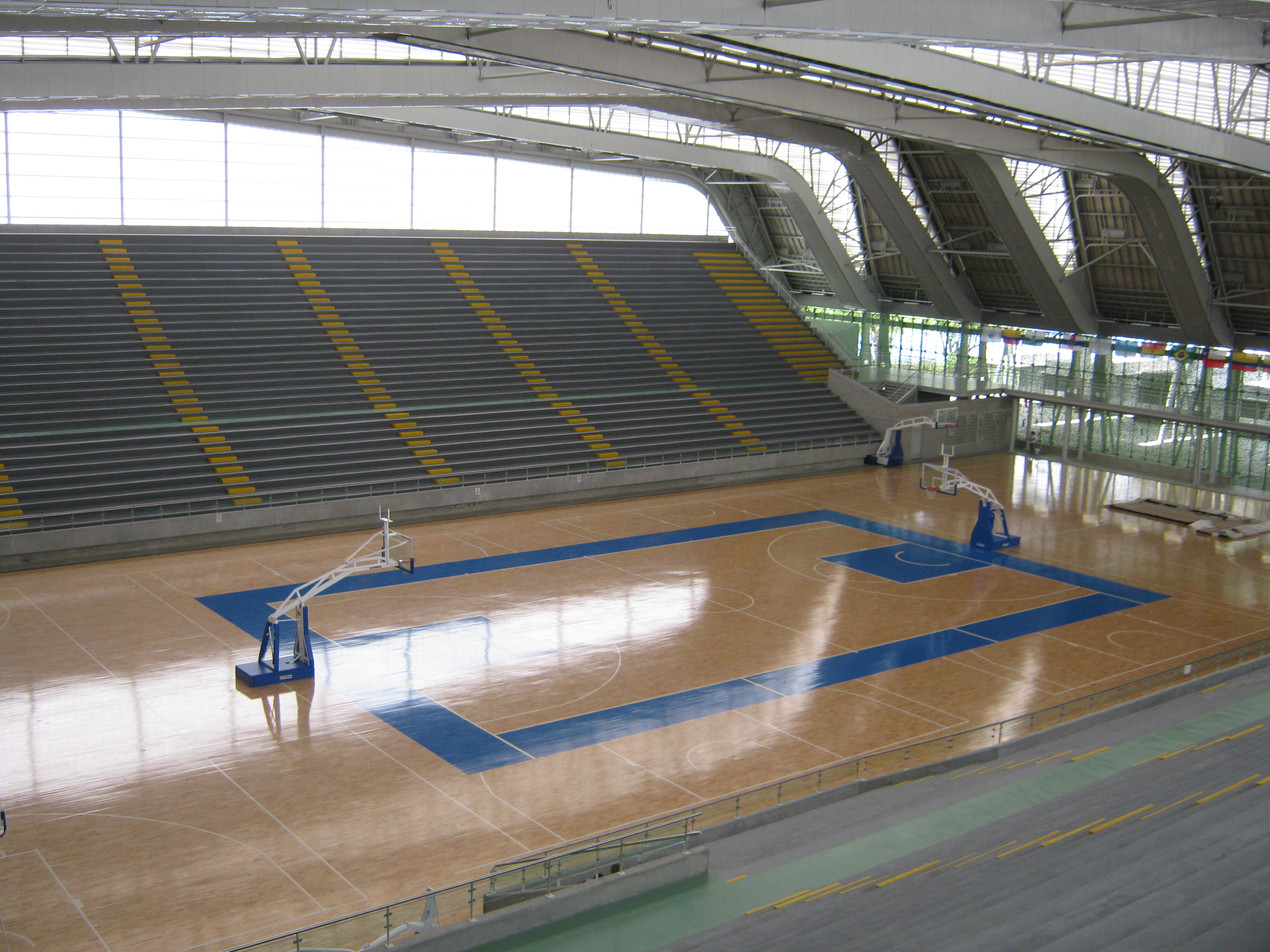 Interior del Coliseo de Baloncesto Iván de Bedout, en la Unidad Deportiva Atanasio Girardot. Medellín. Colombia.